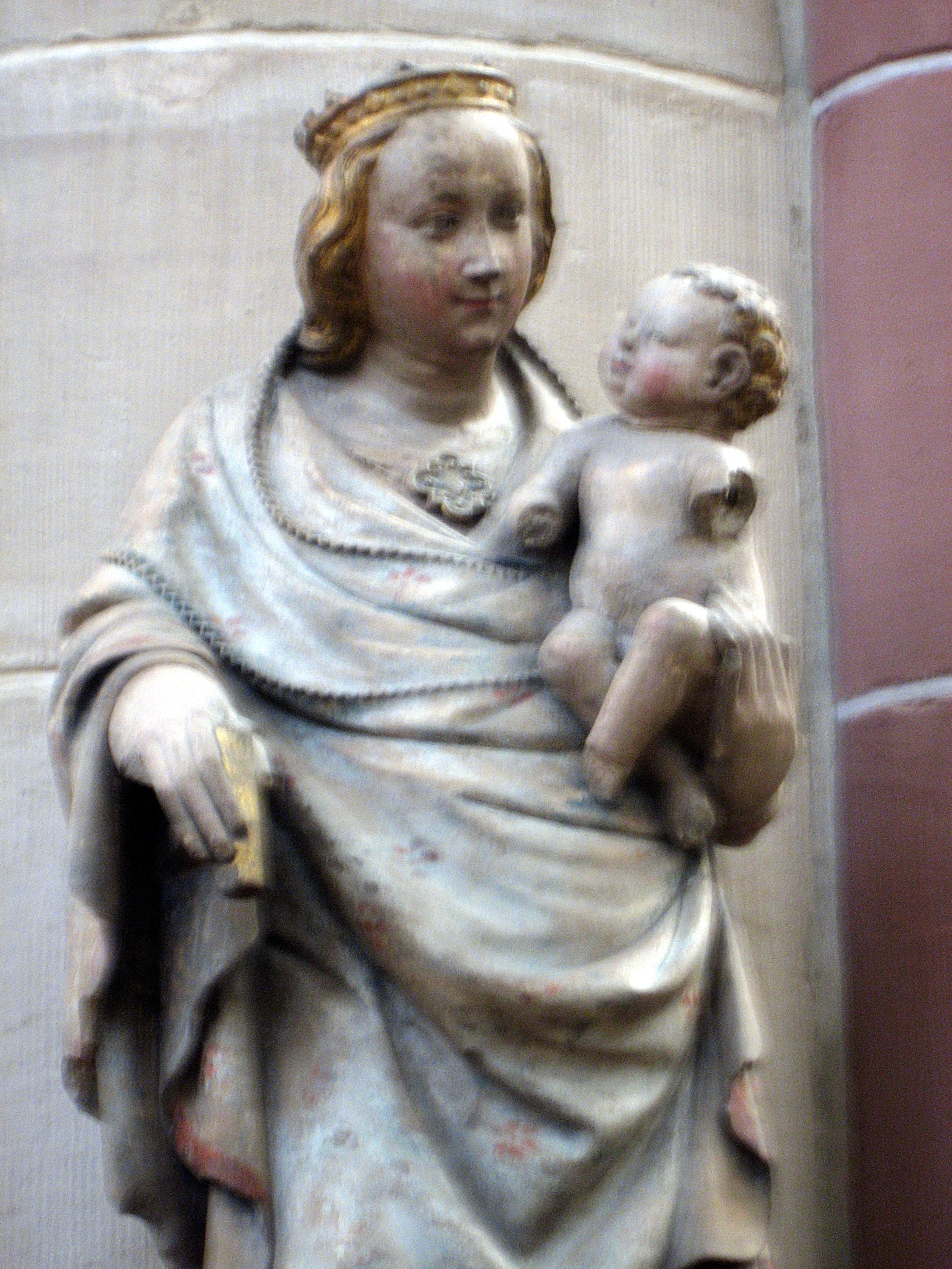 Propsteikirche Dortmund